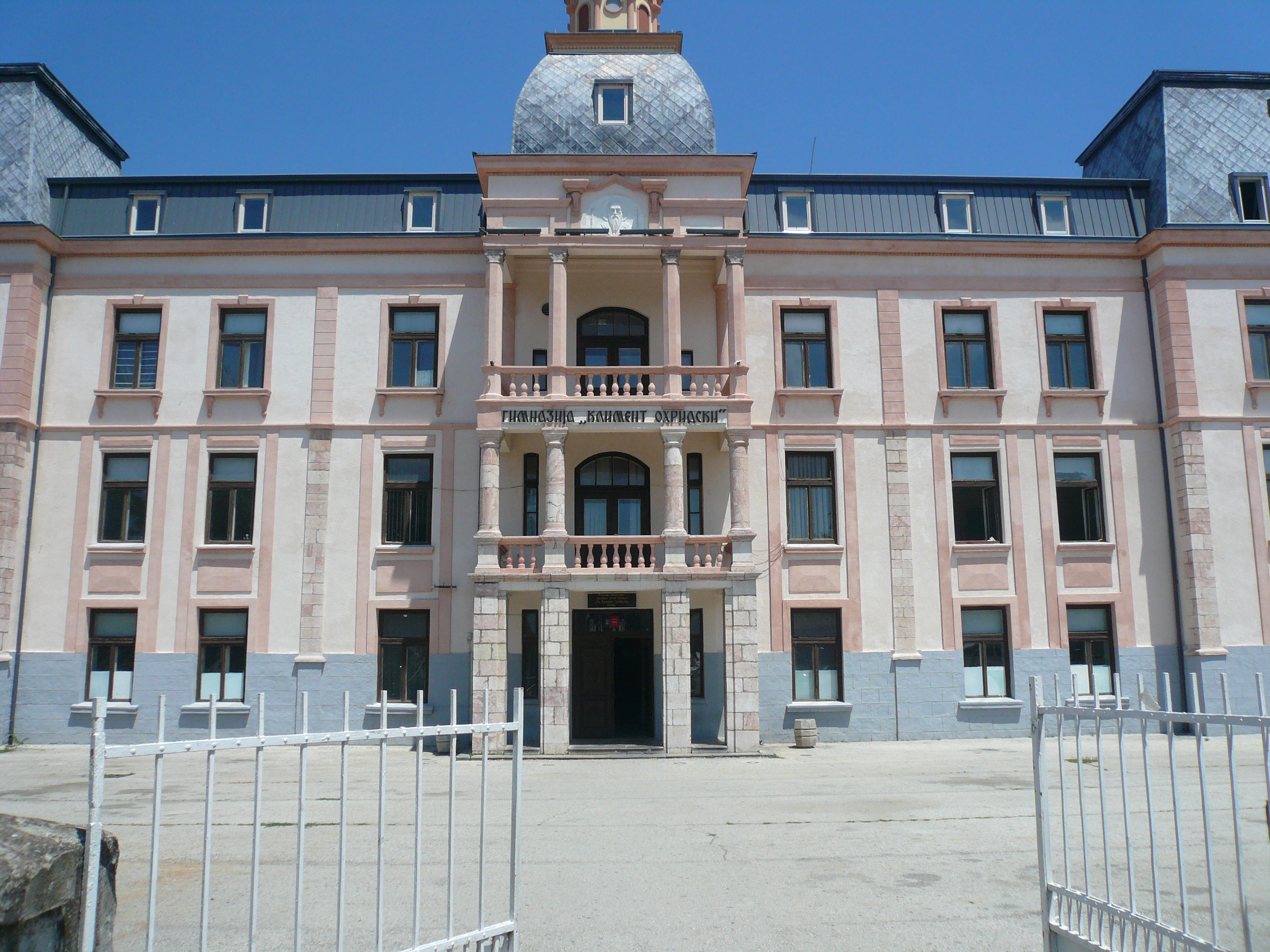 Autor: Rašo Avramovski. ohrid